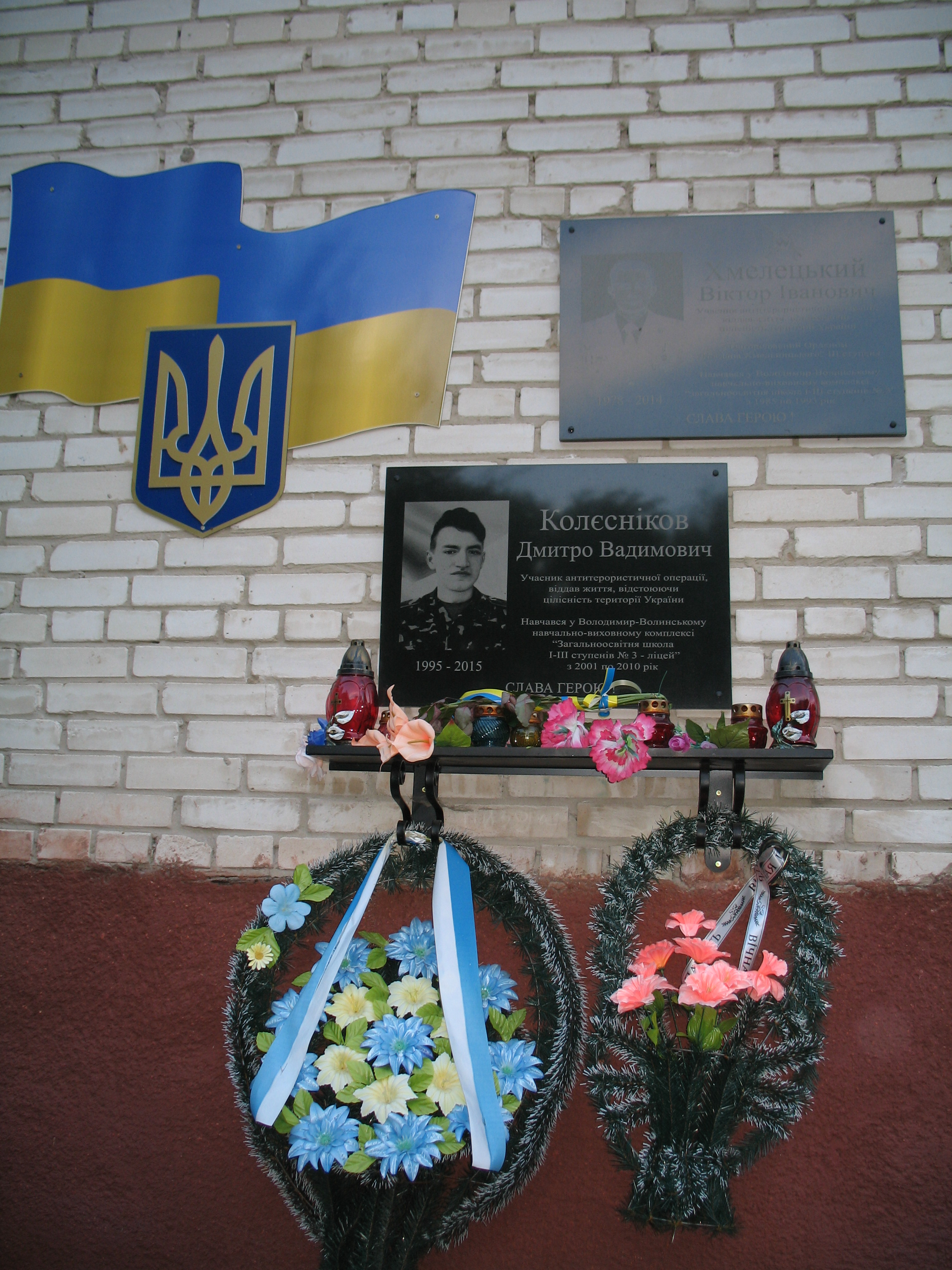 Володимир-Волинський. Меморіальні дошки на будівлі школи № 3 по вул.Ковельській, 111 з портретом та написом «1995-2015 Колєсніков Дмитро Вадимович Учасник антитерористичної операції, віддав життя, відстоюючи цілісність території України. Навчався у Володимир-Волинському навчально-виховному комплексі «Загальноосвітня школа І-ІІІ ступенів № 3- ліцей» з 2001 по 2010 рік. Слава герою!» та «1978-2014 Хмелецький Віктор Іванович Учасник антитерористичної операції, віддав життя, відстоюючи цілісність території України. Нагороджений орденом "Богдана Хмельницького" ІІІ ступеня. Навчався у Володимир-Волинському навчально-виховному комплексі «Загальноосвітня школа І-ІІІ ступенів № 3- ліцей» з 1985 по 1993 рік. Слава герою!»